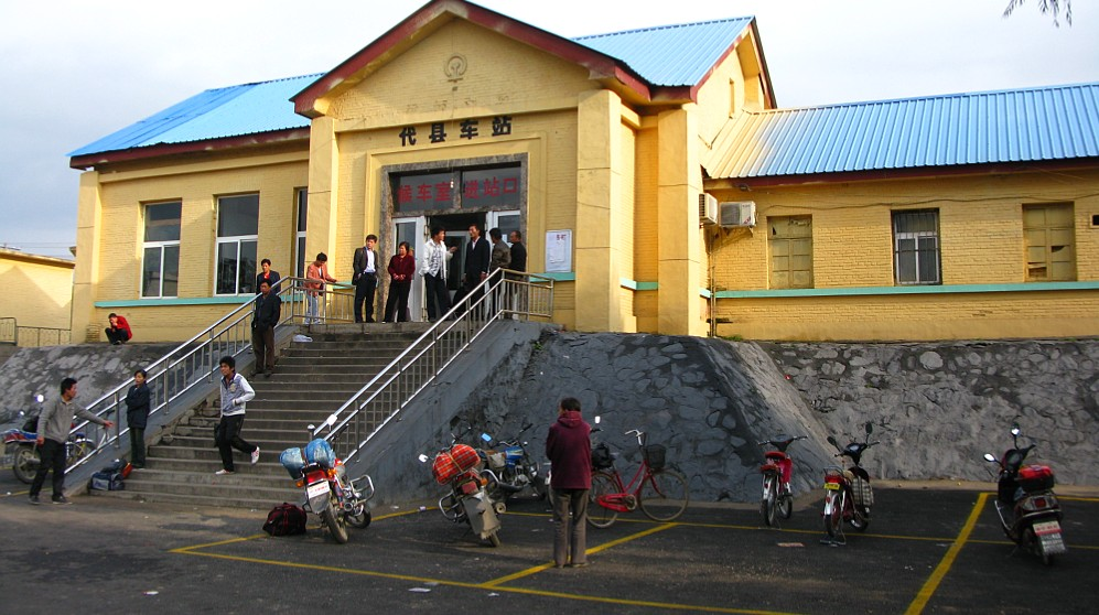 代县火车站-流浪的狗狗